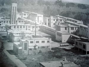 Vista aérea del Sanatorio de Huipulco en construcción, segun los planos de Cosío Villegas y Villagrán.